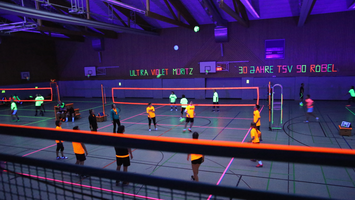 Erstes Schwarzlicht–Volleyballturnier des TSV 90 Röbel e. V. in der Röbeler Sporthalle, das 3. oder 4. Schwarzlichtturnier in Deutschland.